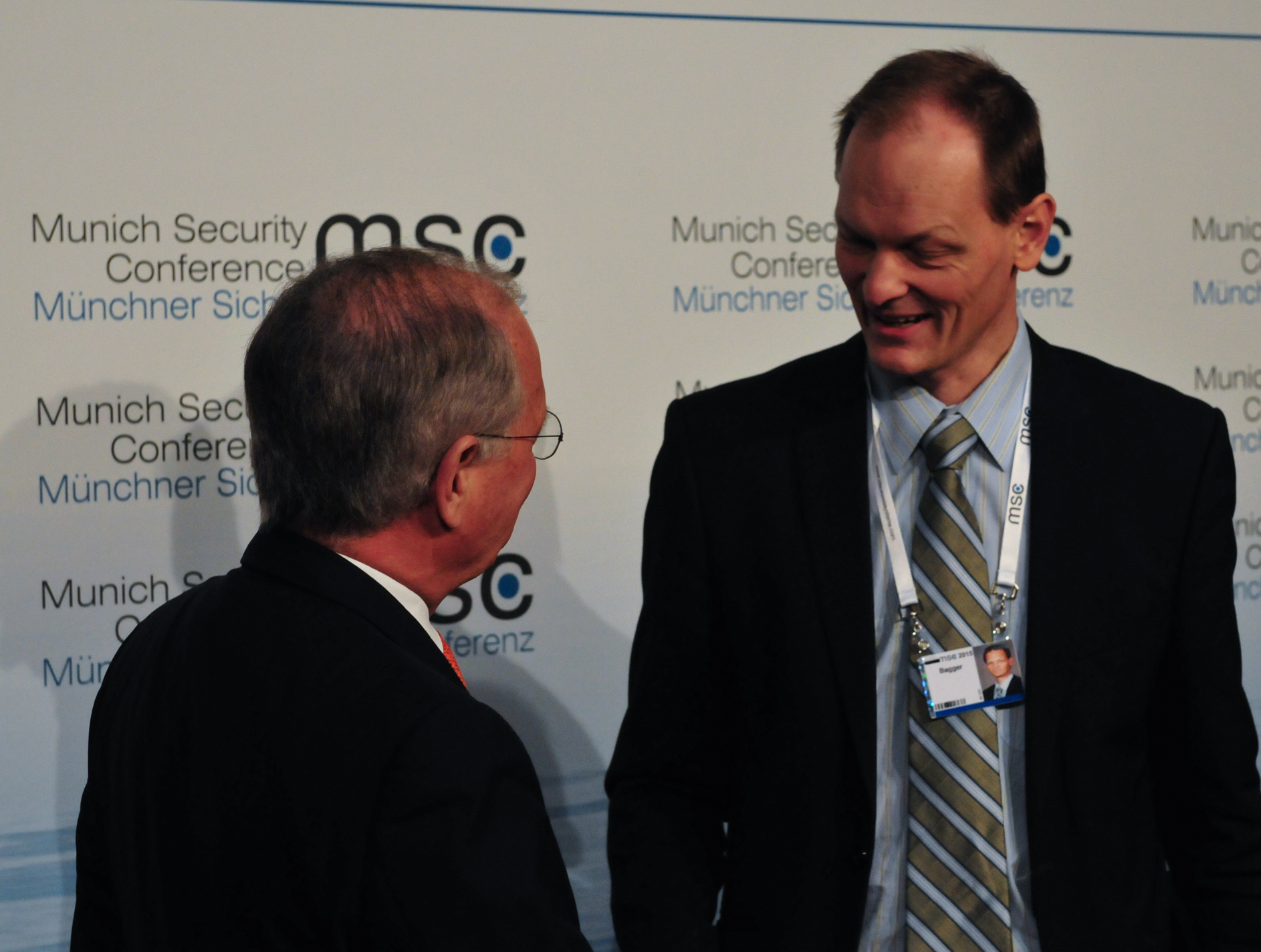 Thomas Bagger, Munich Security Conference 2015 - Münchner Sicherheitskonferenz 2015